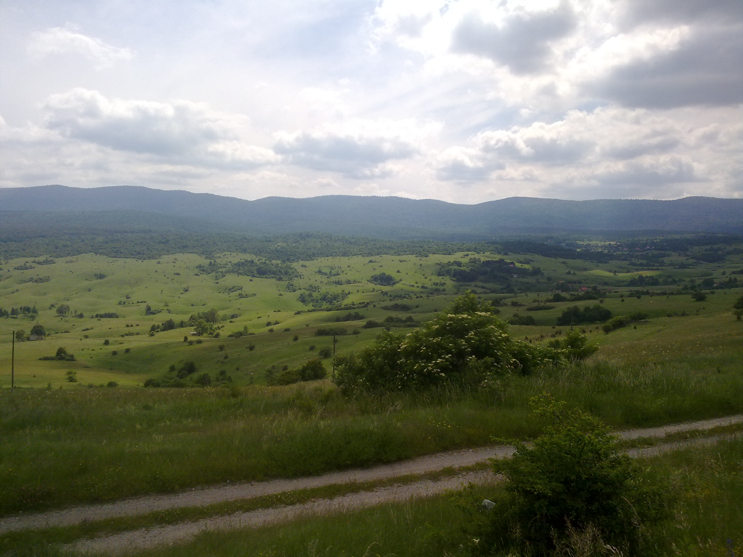 Bravsko